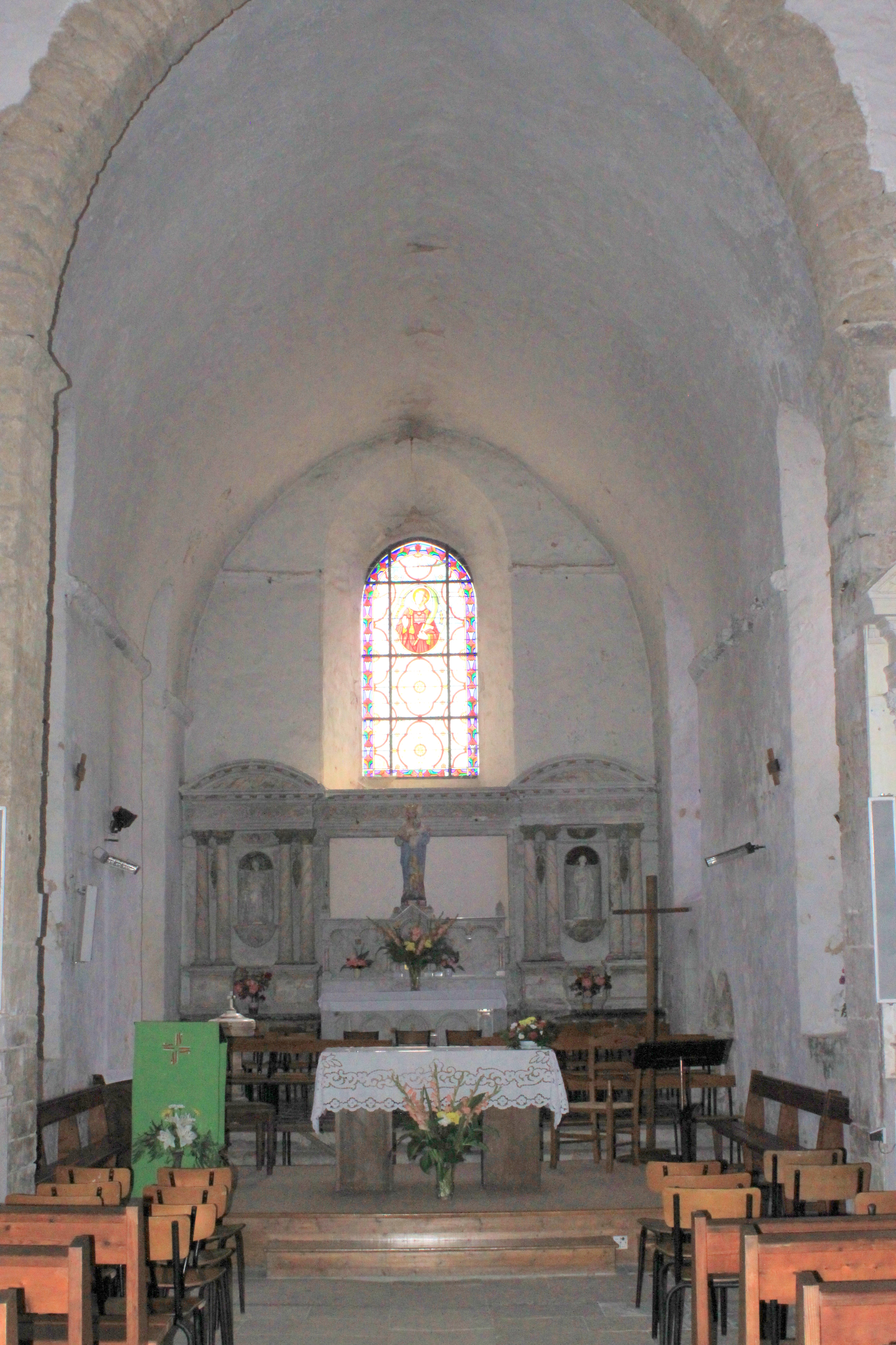 Nef, église Saint-Vincent, Fr-85-Saint-Vincent-sur-Jard.